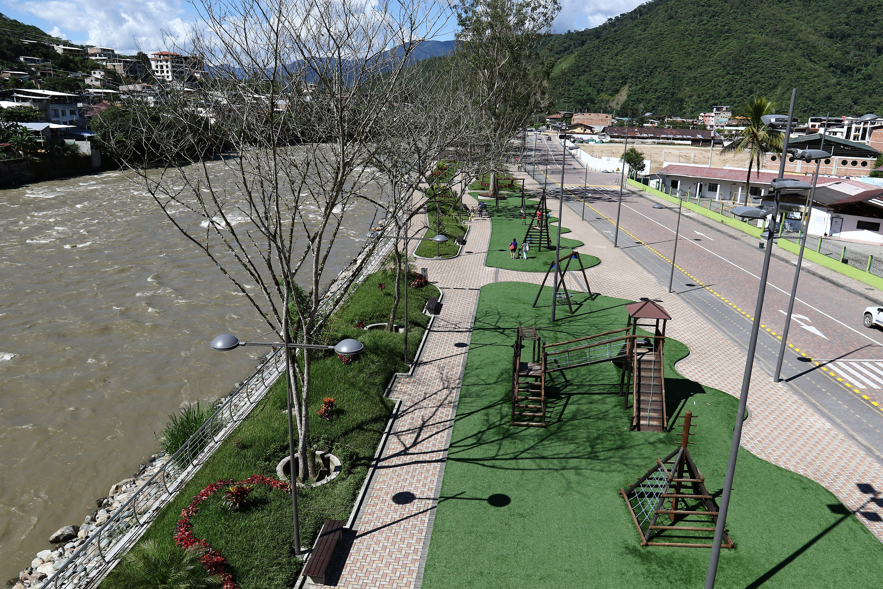 Zamora, Zamora Chinchipe 22 Jul (Andes).- El nuevo parque lineal en la ciudad de Zamora, una obra del gobierno central que disfrutan ciudadanos de la provincia y la ciudad. Fotografías: Carlos Rodríguez/Andes.